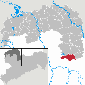 Mügeln in Saxony - Landkreis Nordsachsen